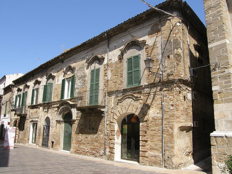 Vasto